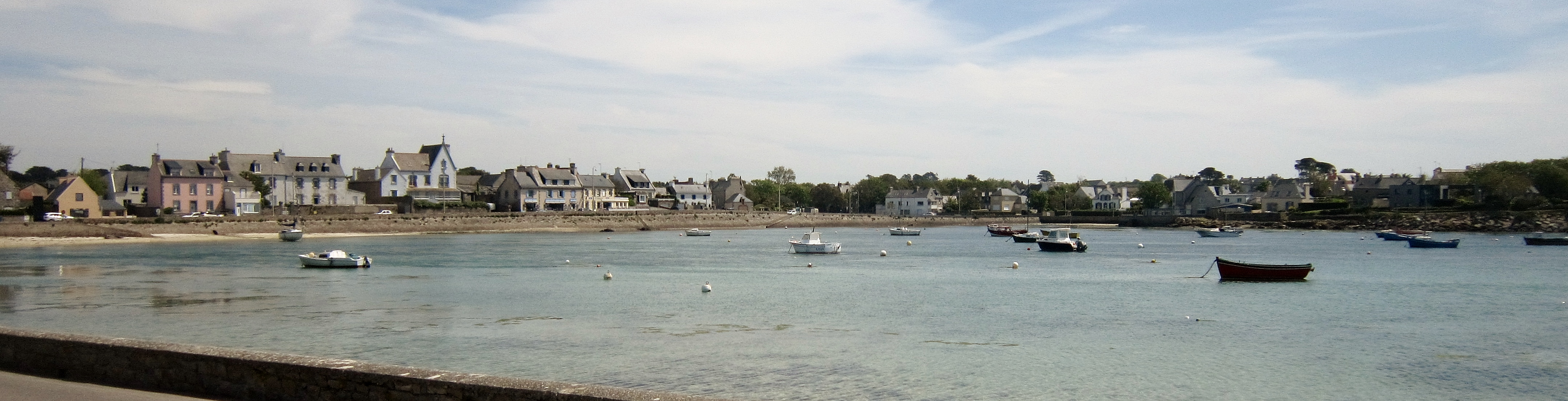 Argenton (en Landunvez) : vue générale de la plage et du hameau.